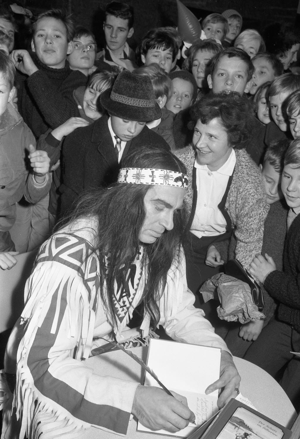 im Kaufhaus Karstadt.